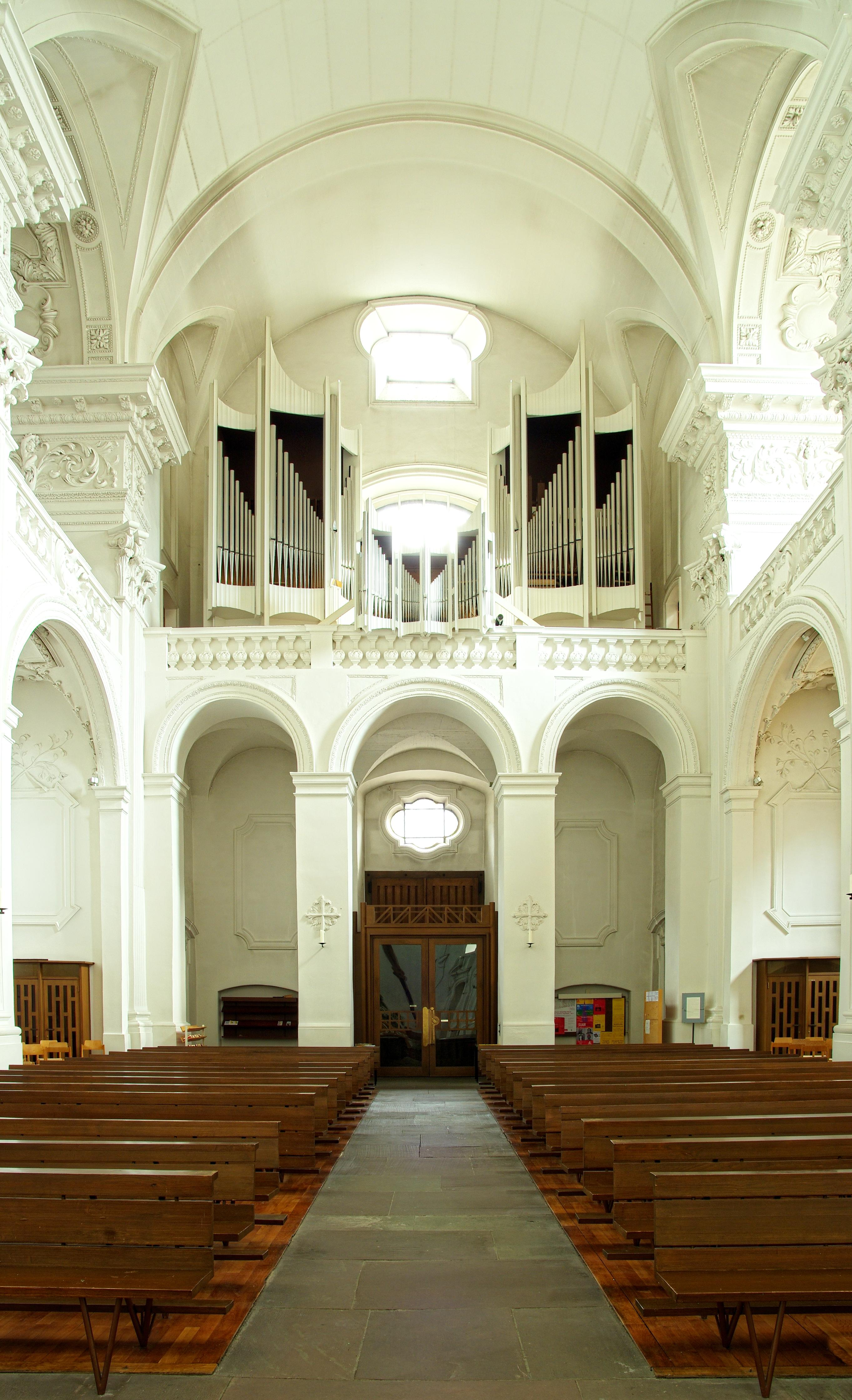 Die Jesuitenkirche in Freiburg auch Unikirche genannt